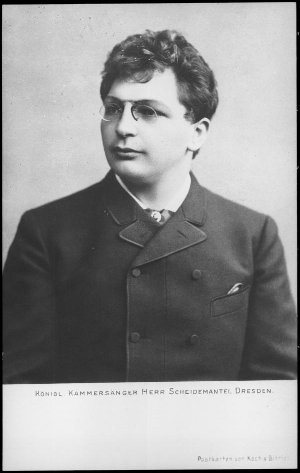 Karl Scheidemantel as young man